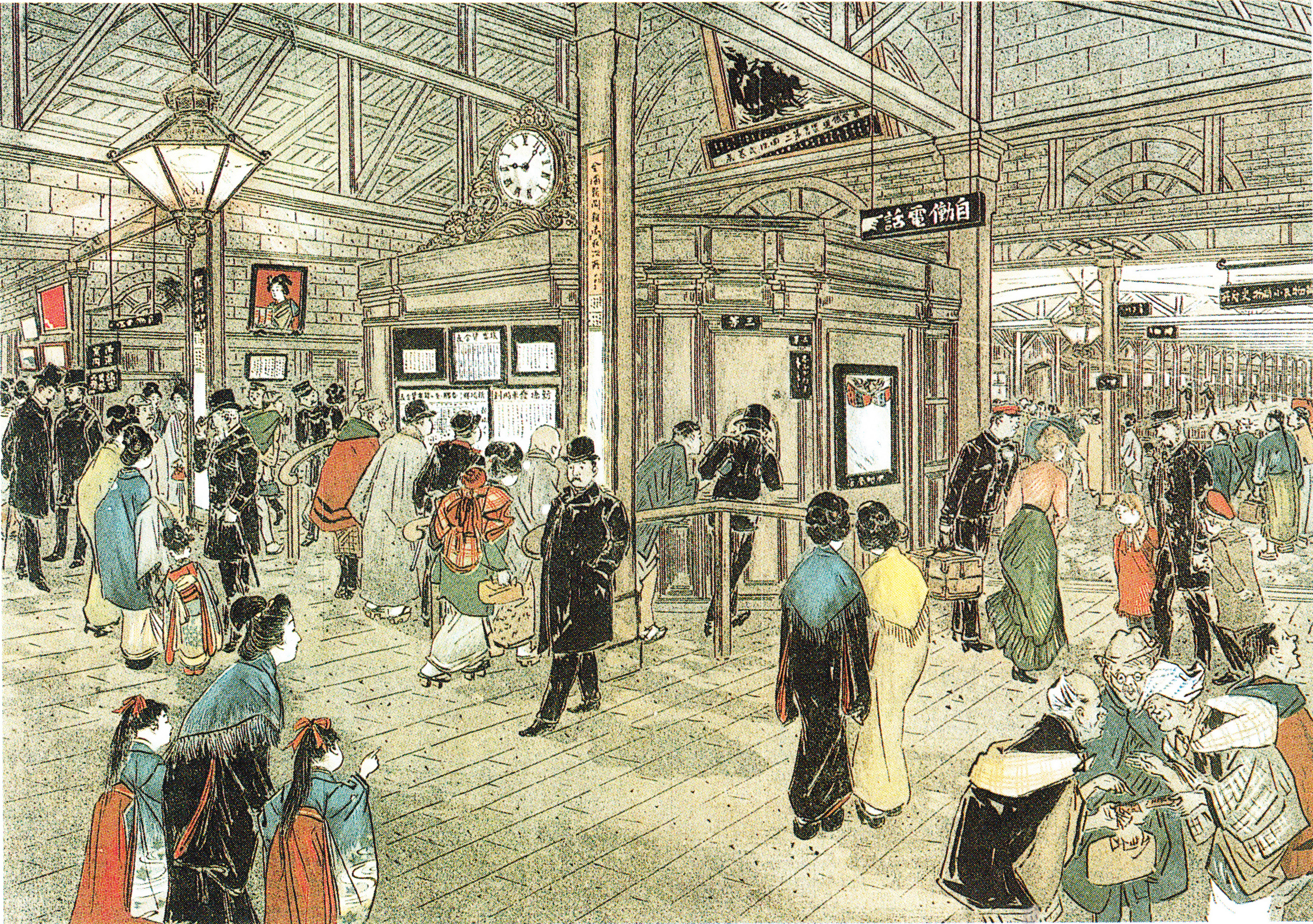 風俗画報「新橋停車場之図」。明治期の旧新橋駅のにぎわい